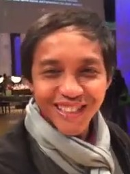 psi.id